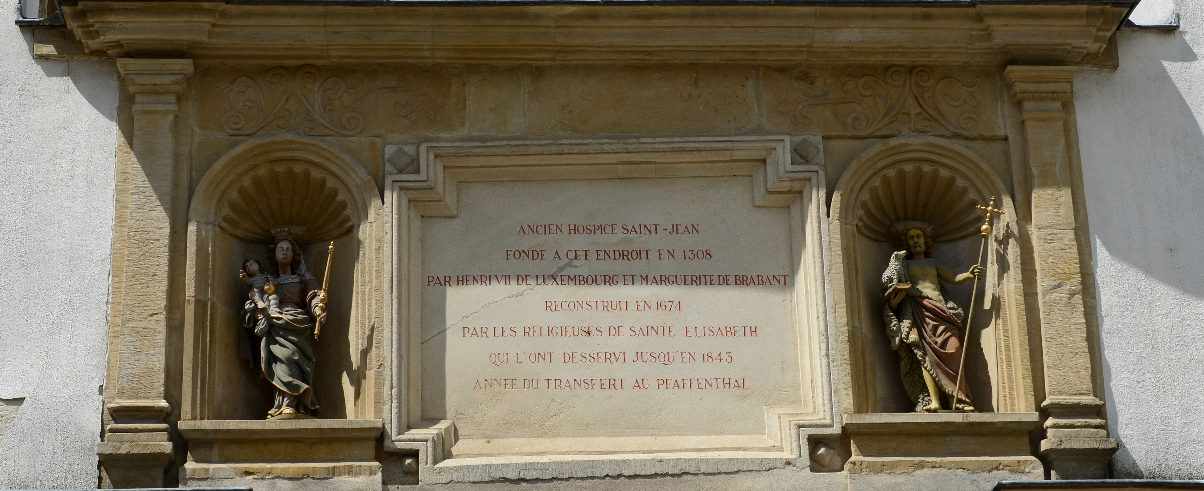 Inskriptioun an Hellegestatuen um Portal vum fréieren Hospice Saint-Jean am Stadgronn, wou lo den Naturmusée dran ass.